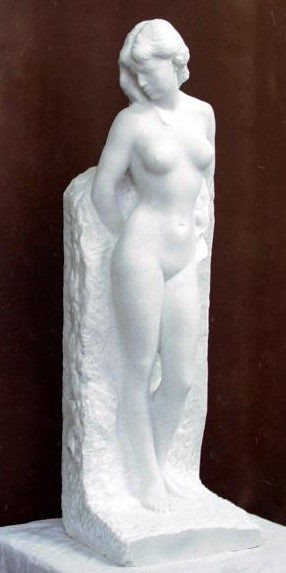 Обнажённая - название мраморной фигуры выполненной скульптором Ахметом Бацкоевичем Цаликовым - наиболее недавнее его произведение. Хранится статуя в мастерской художника, фотография предоставлена самим автором